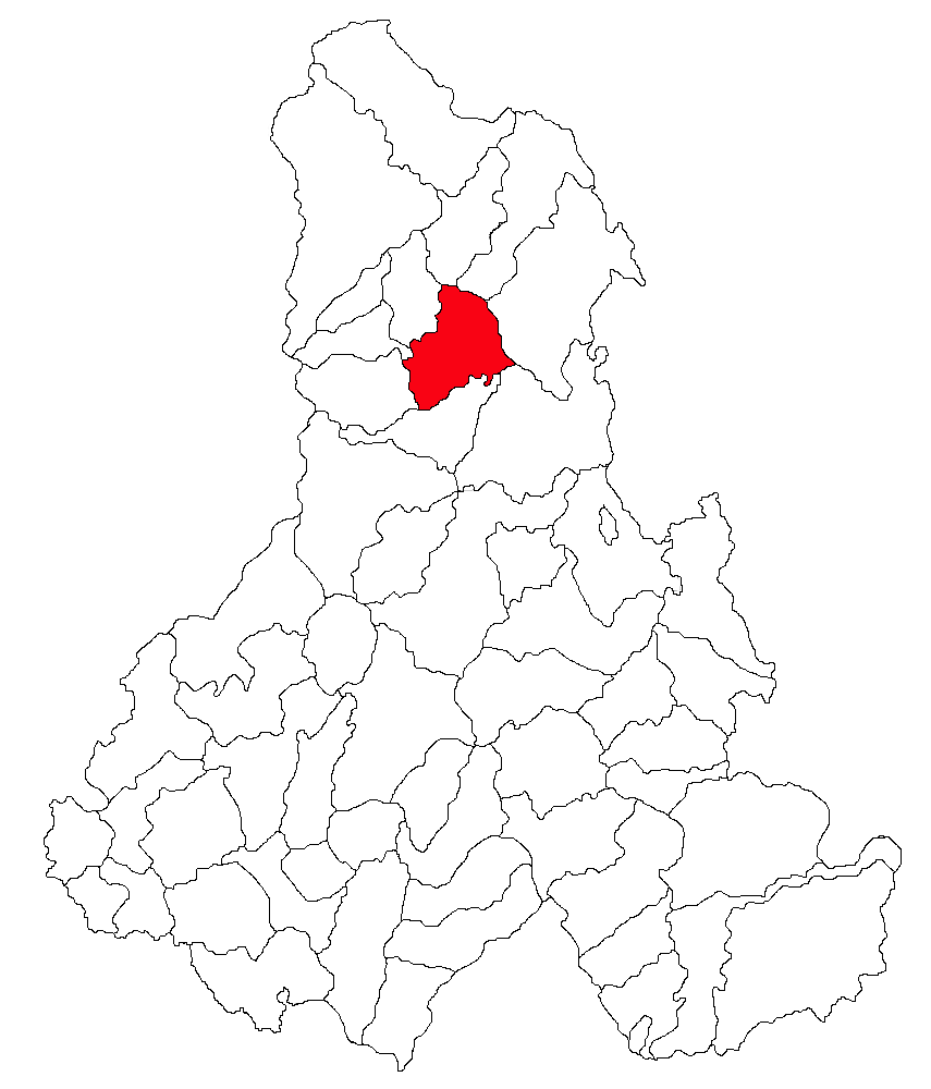 Categorie:Hărţi ale judeţului Harghita Contents 1 Licensing 2 Sursă 3 Licensing 4 Original upload log Licensing Sursă ro::Imagine:Harta_jud_Harghita.png